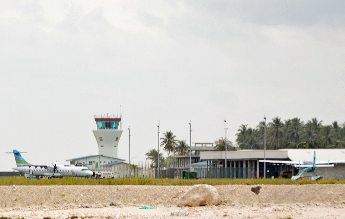 Maamigili Airport, Maldives